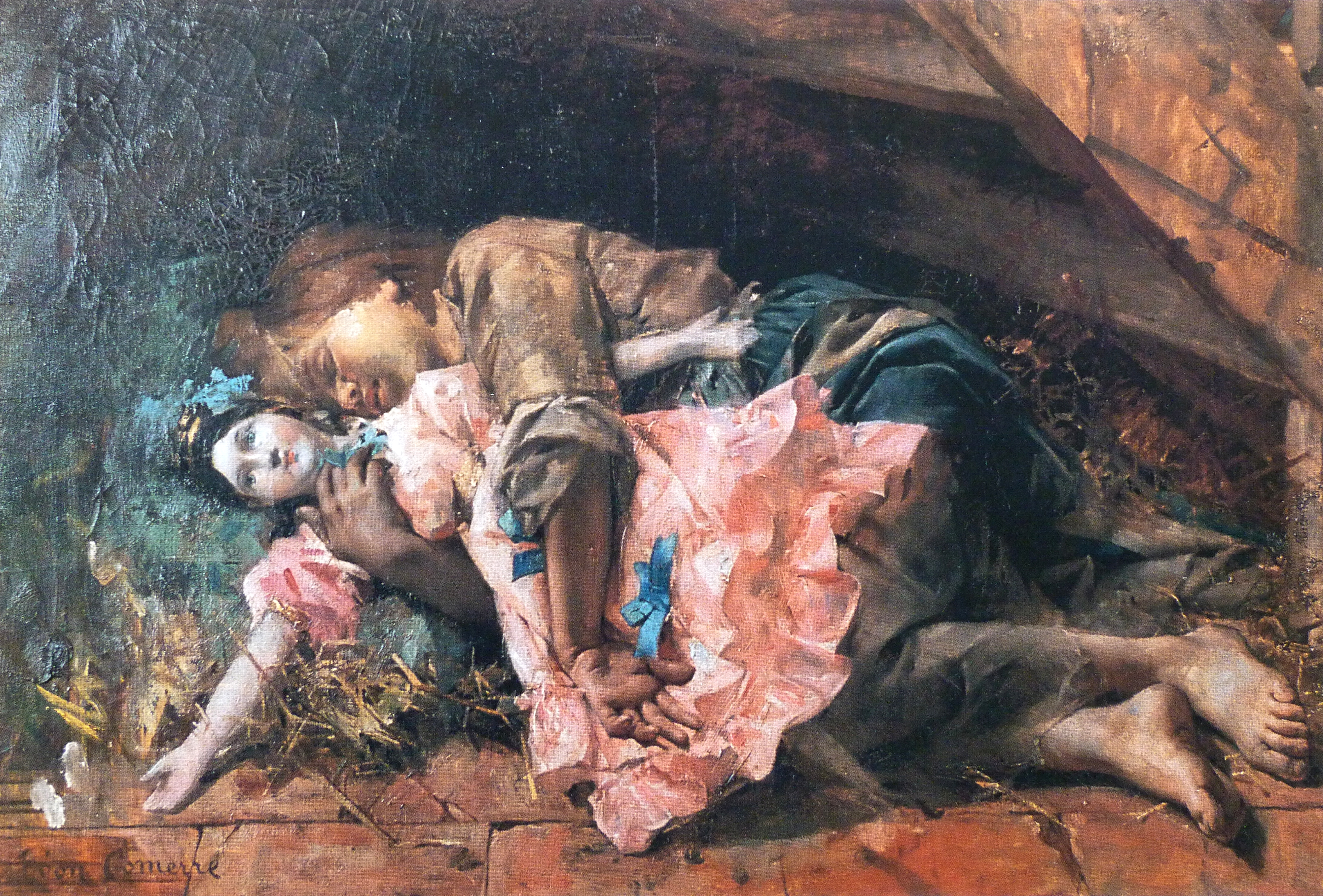 La poupée de Cosette, huile sur toile par Léon-François Comerre, conservé à la mairie de Trélon (Nord), sa ville natale - Reproduit dans Lorsque l'enfant paraît... Victor Hugo et l'enfance, catalogue de l'exposition du même nom tenue au Musée Victor Hugo de Villequier, du 27 avril au 18 août 2002. Direction de publication Evelyne Porel, éditeur Somogy, éditions d'Art, Paris, 2002. - ISBN : 2-85056-531-8 - Photo de la reproduction par Siren-Com.